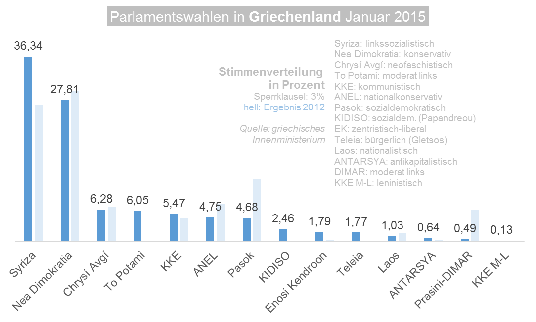 Wahlergebnisse bei den Parlamentswahlen in Griechenland 2015 / Prozent